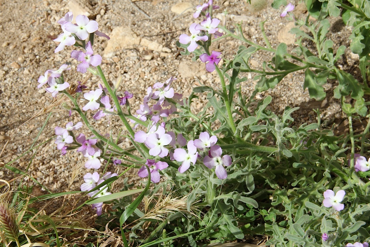 Matthiola tricuspidata (det. User:RLJ)